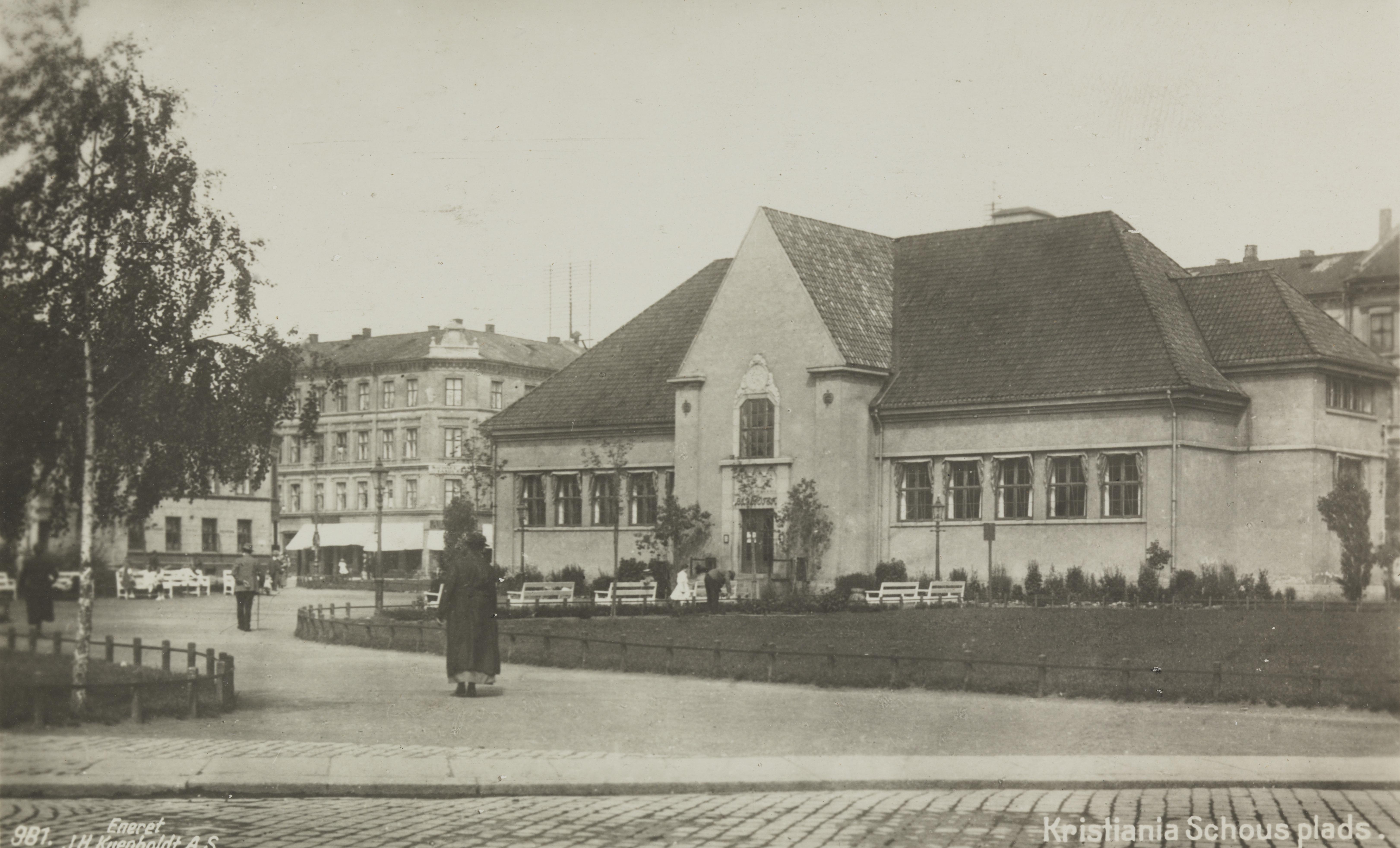 Bildet er hentet fra Nasjonalbibliotekets bildesamling Grünerløkka,Schous plass, Oslo, Oslo